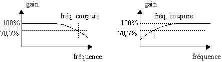 Définition de la fréquence de coupure d'un filtre passe-haut et passe-bas. Créé par utilisateur Lucien Duval le 5 décembre 2005.